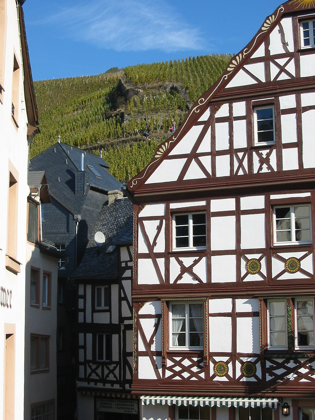 Blick von Bernkastel in die Weinbergslage Bernkasteler Doctor